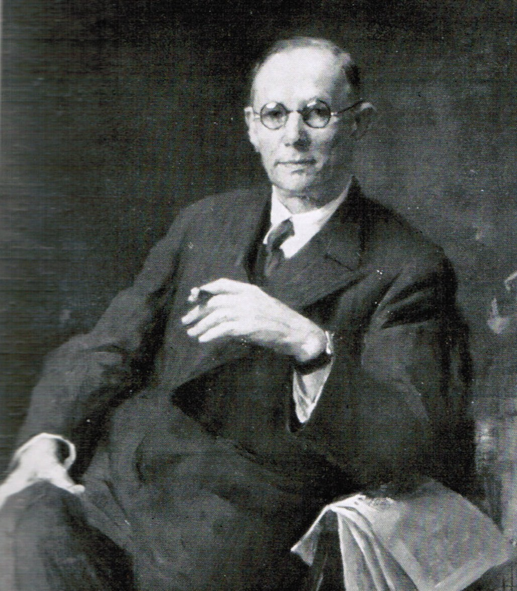 Johannes Berggreen